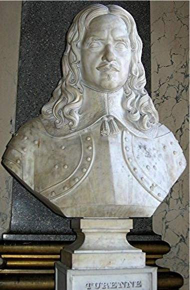 Jean-Jacques Flatters (1786-1845): Henri de La Tour d'Auvergnes, vicomte de Turenne (1611-1675), portrait en buste sur piédouche (approx. 1834), marbre, Versailles, Musée national des châteaux de Versailles et Trianon, Galerie des batailles.